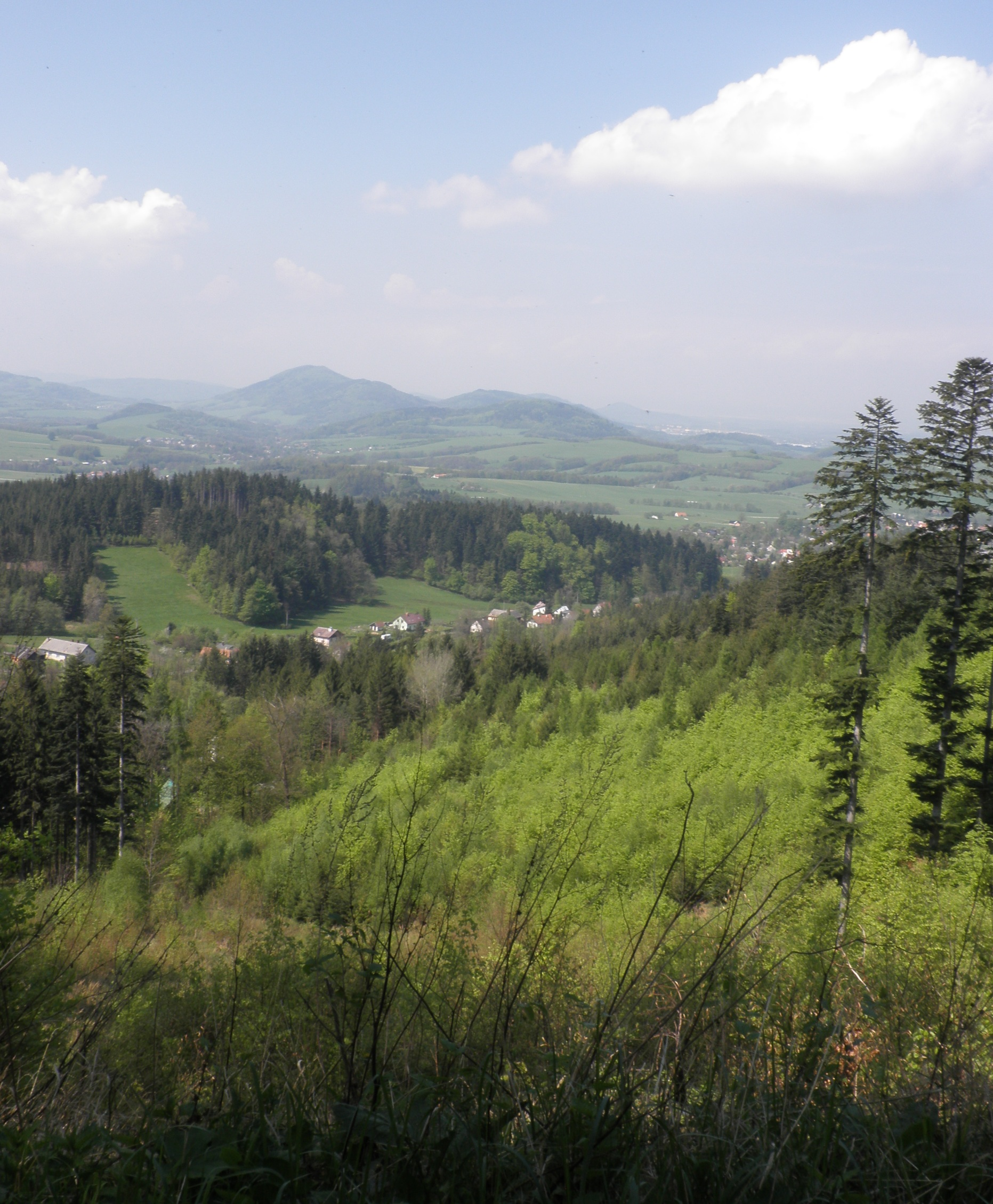 Pohled na obce Kozlovice (v popředí) a Tichou (v pozadí)